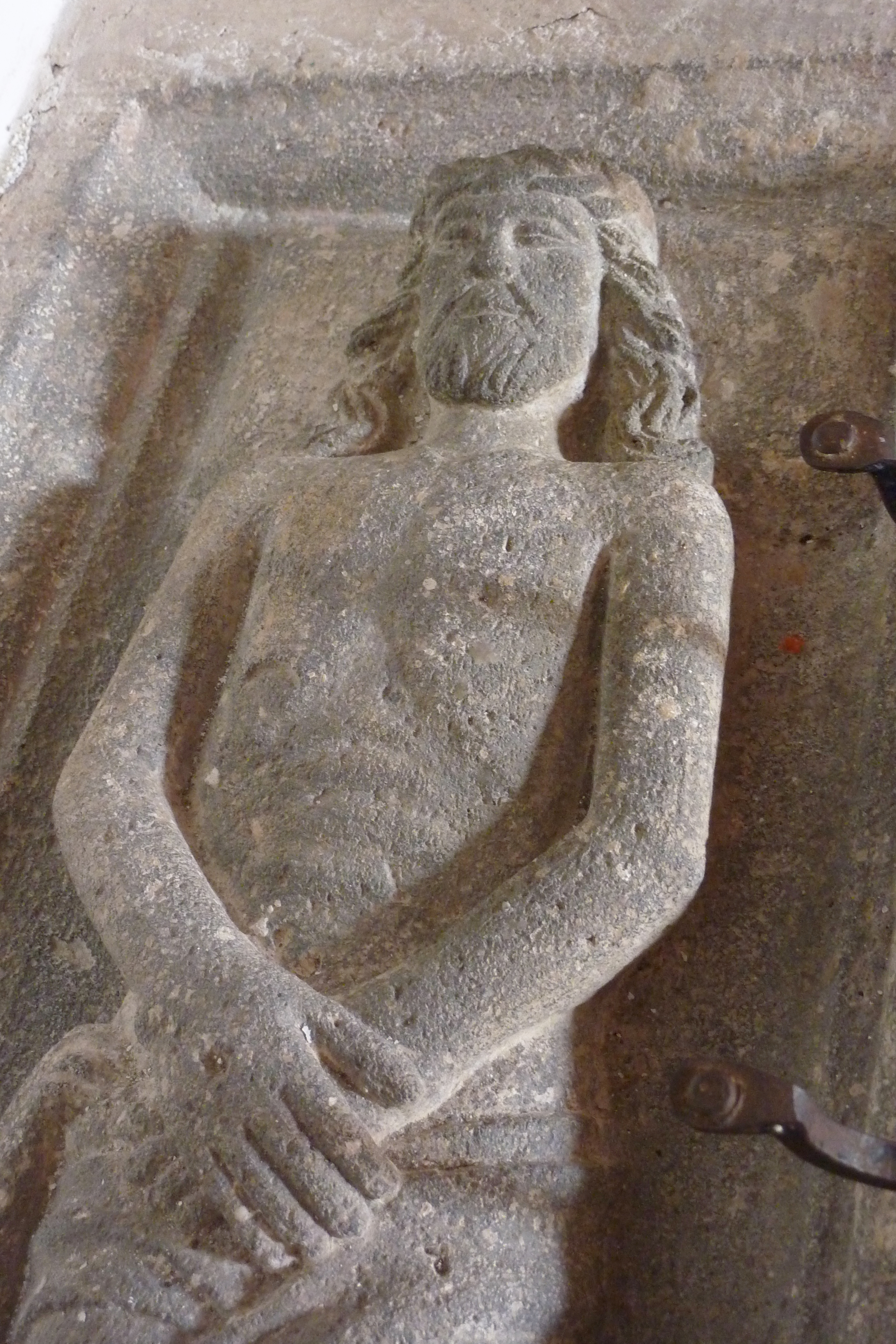 katholische Pfarrkirche St. Gangolf in Mertloch, hl. Grab